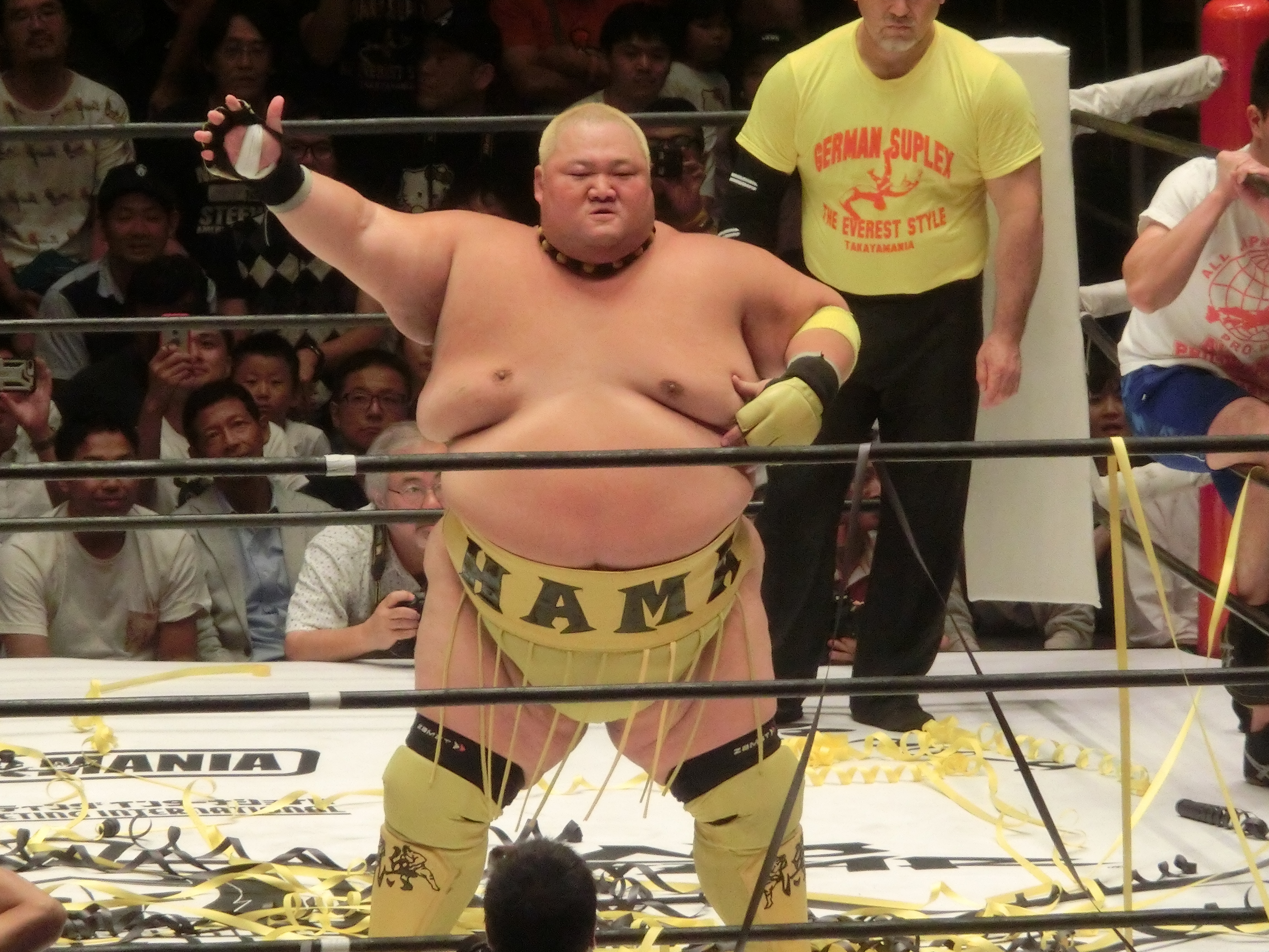 2018年8月31日、後楽園ホール